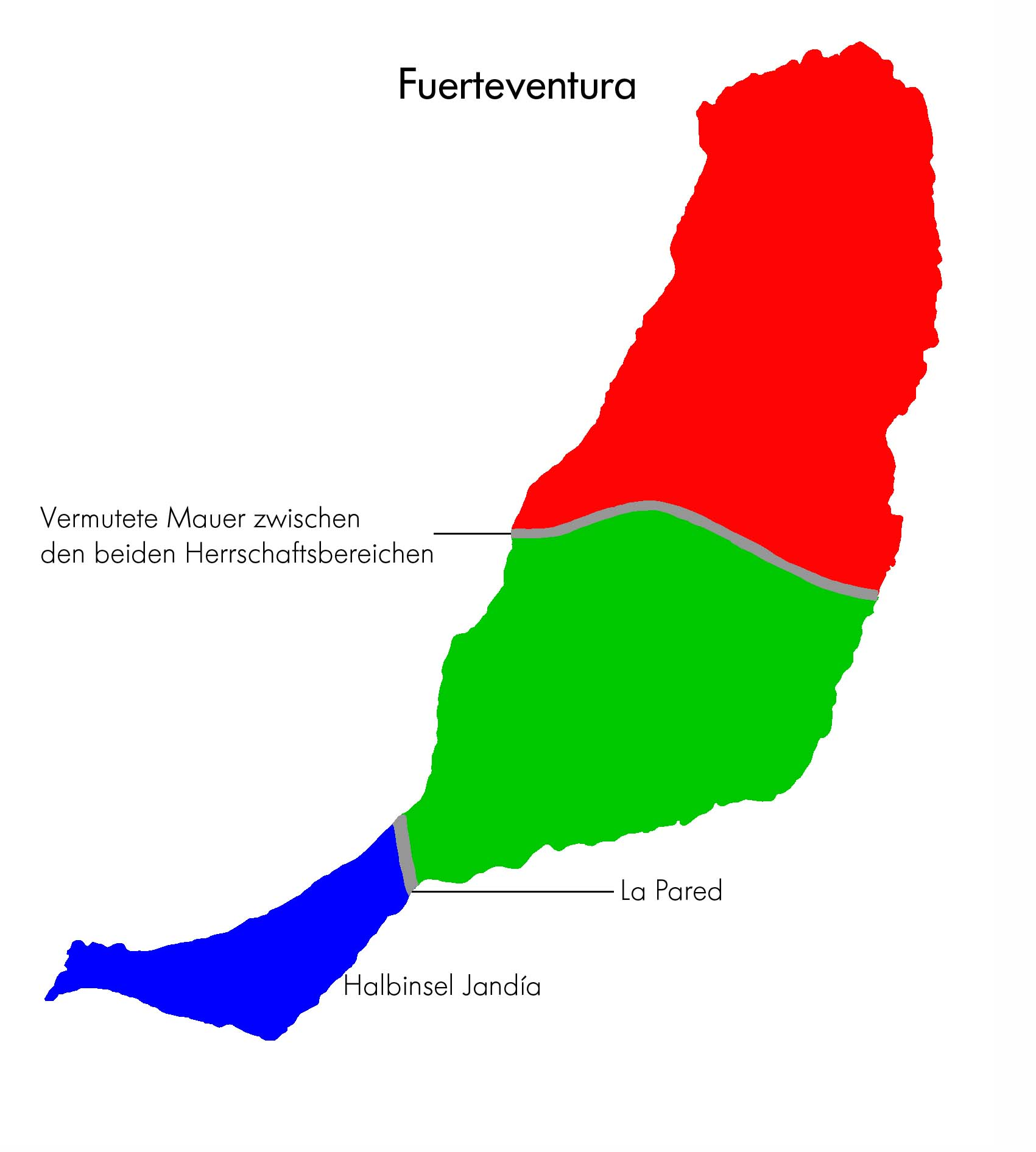 Fuente: José Carlos Cabrera Pérez; La prehistoria de Fuerteventura un modelo insular de adaptación; S. 293